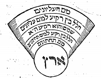 תרשים של מים העליונים מתוך מעשה טוביה יסניץ ה'ת"פ